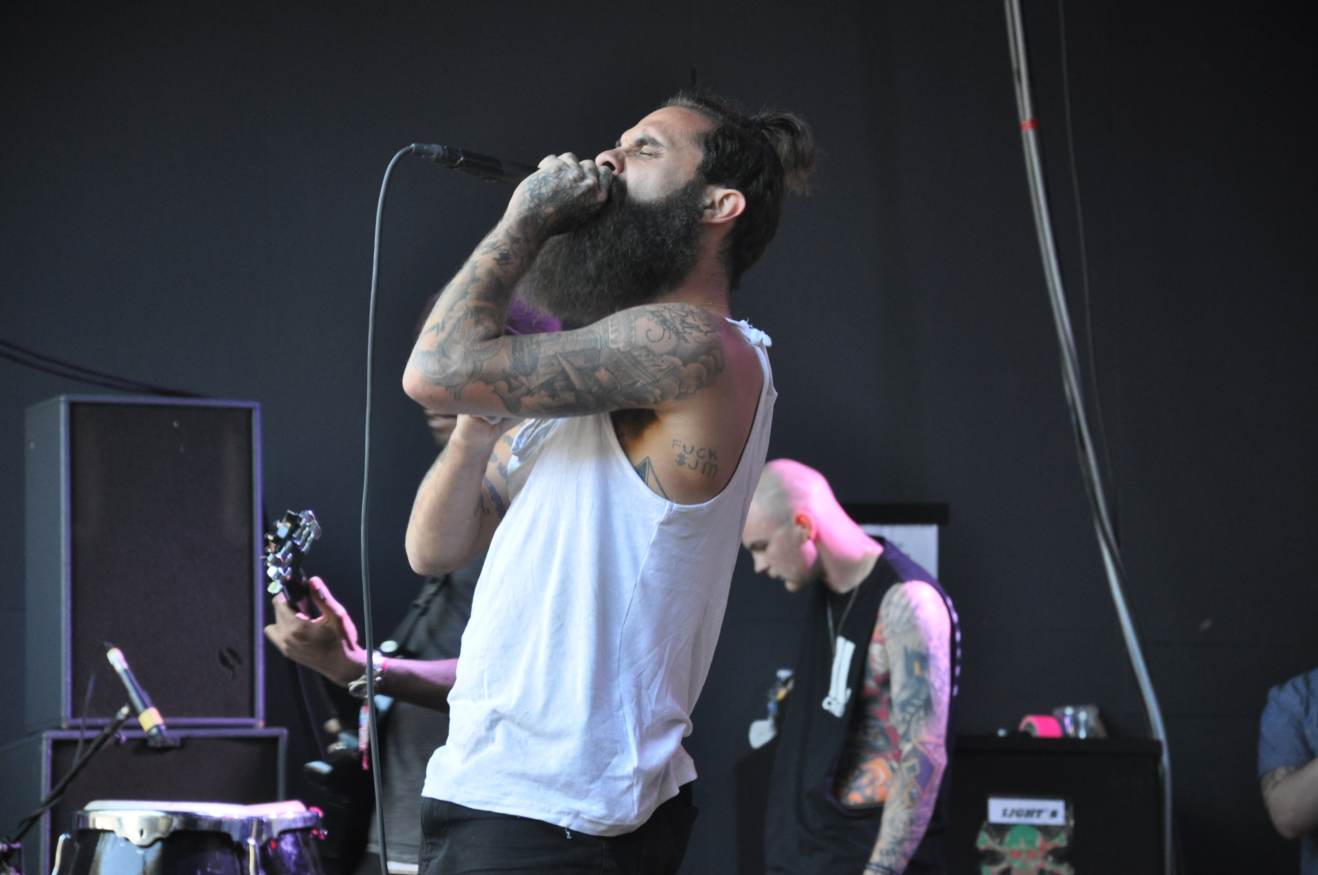 Letlive auf dem Summerblast Festival 2014